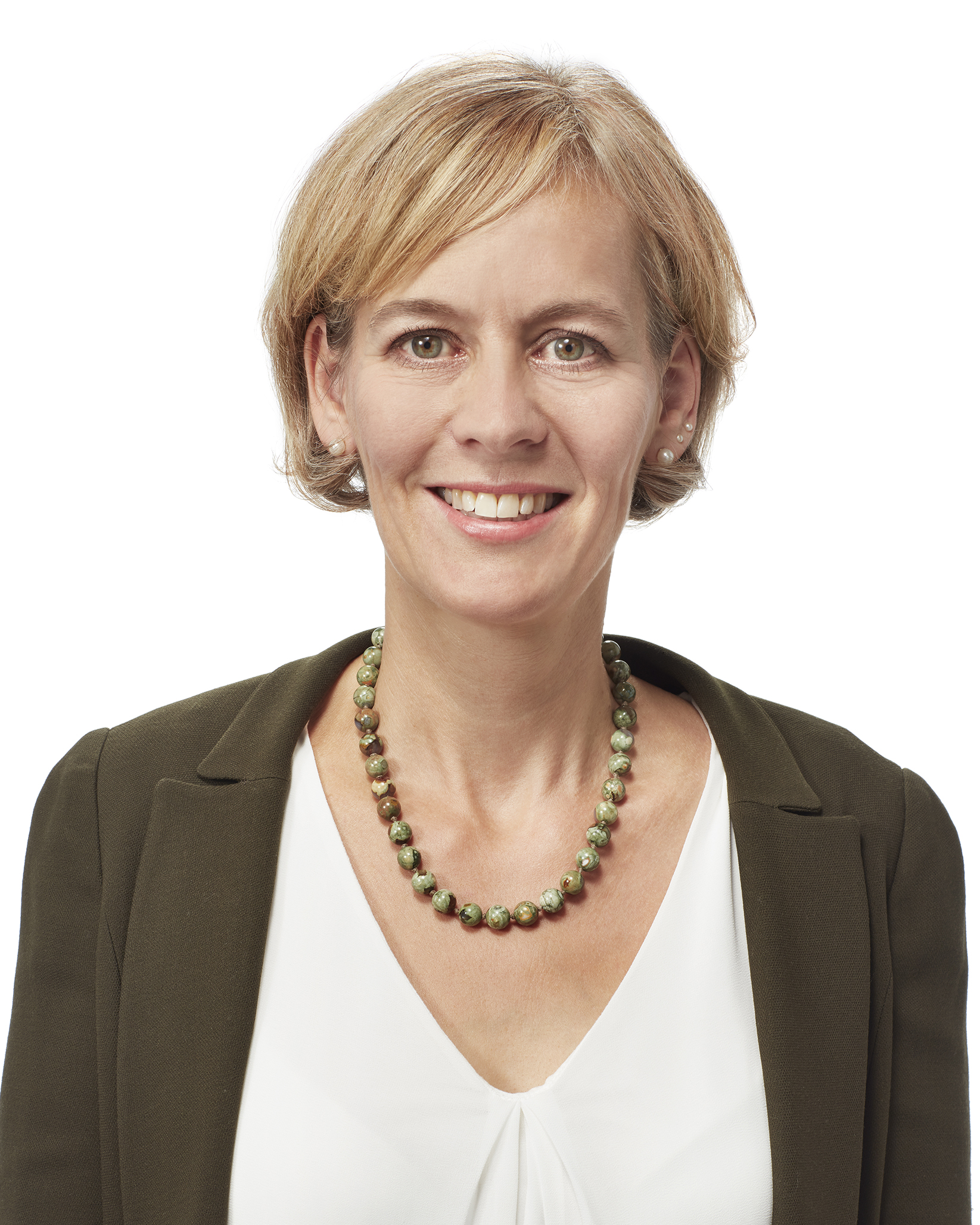 Sonja Gehrig, Mitglied der grünliberalen Partei Schweiz am Mittwoch (10.10.18) im Studio in Zürich